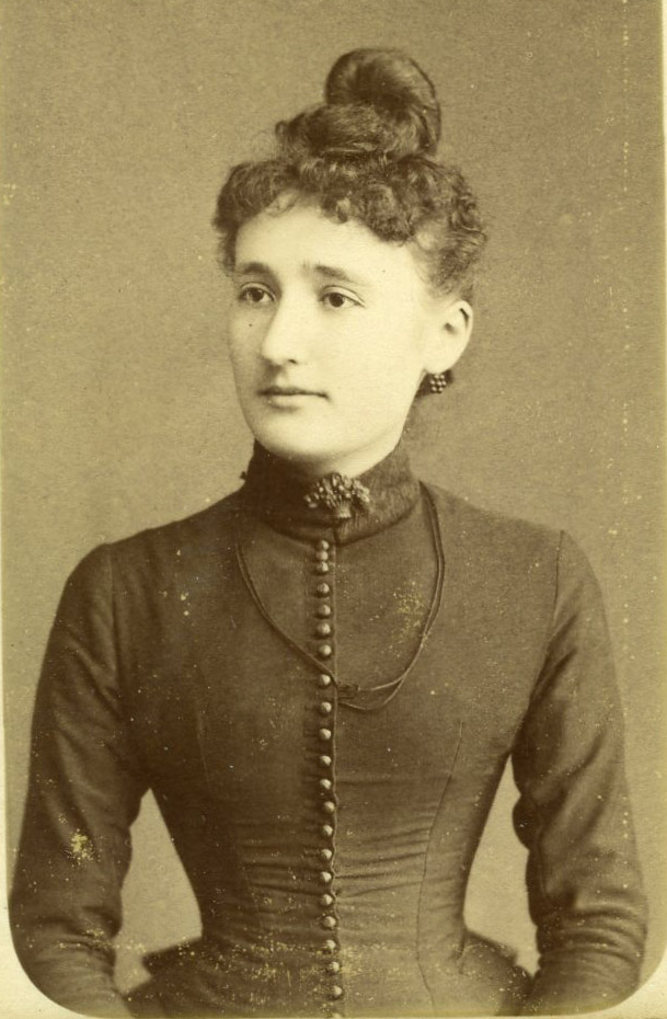 Portrait Claire Mohant (1851 - 1919)